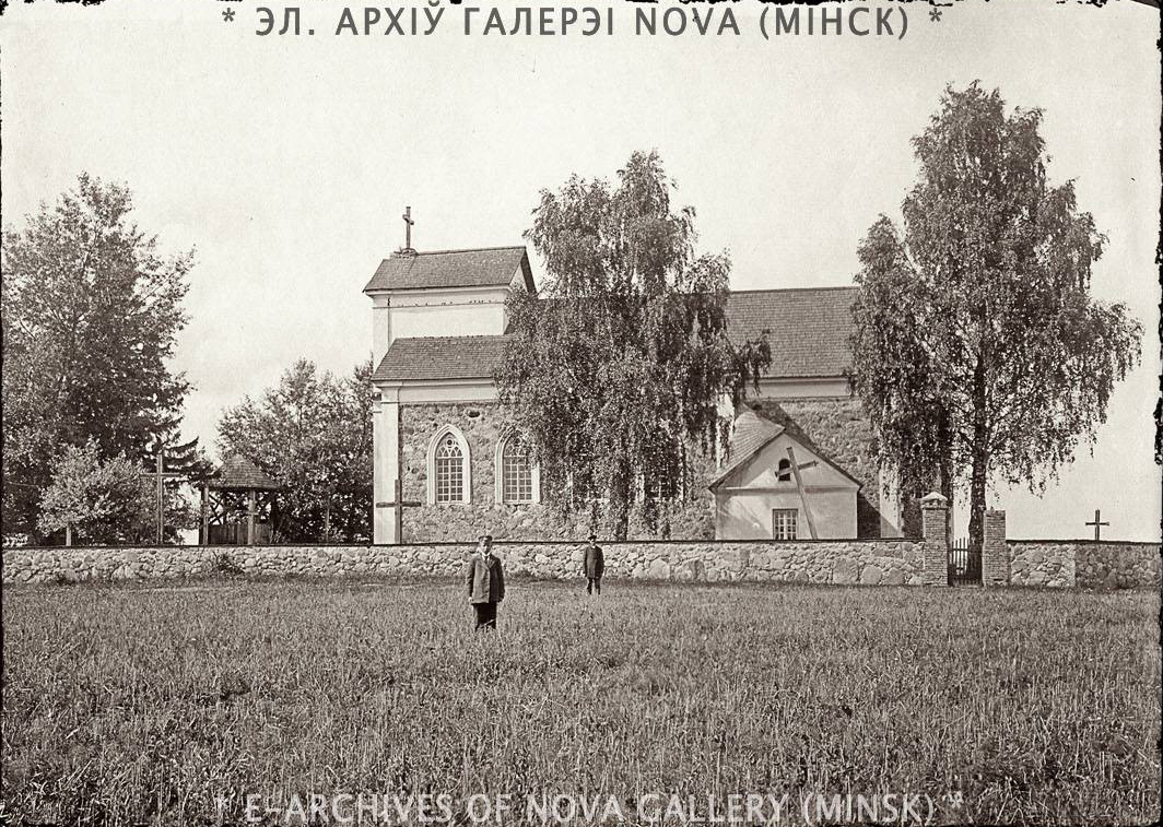 Беларуская (тарашкевіца): Германішкі (Hiermaniški). Касьцёл